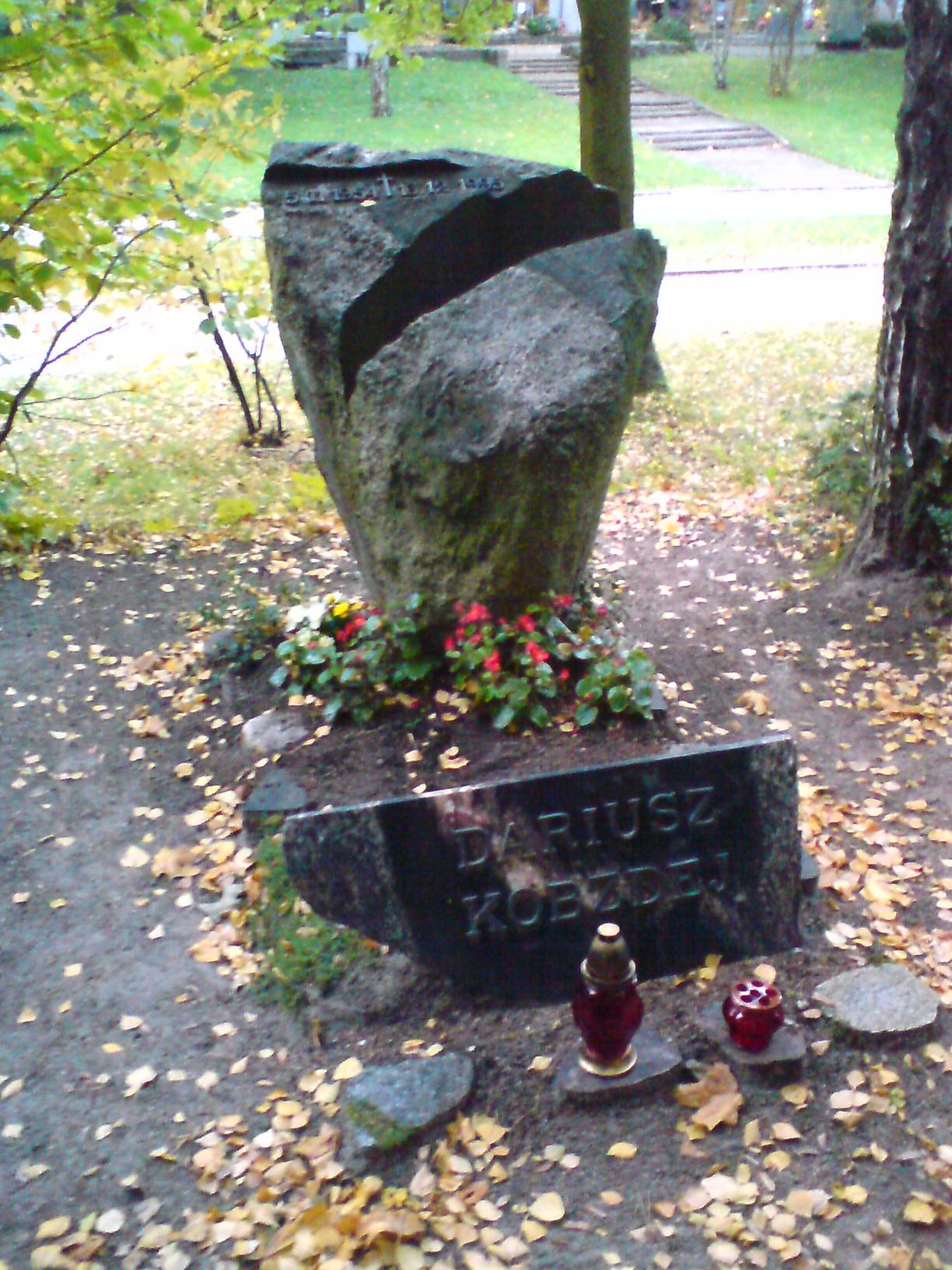 Grób Dariusza Kobzdeja na cmentarzu Srebrzysko w Gdańsku.